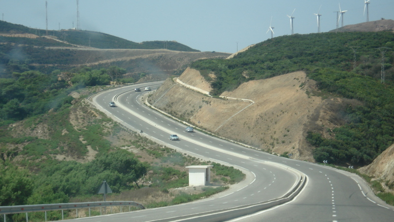 Voie rapide Fnideq - Oued Rmel (Maroc)